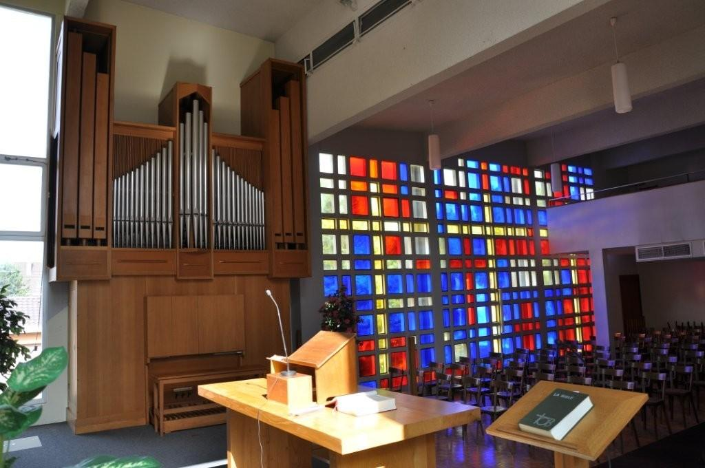 Intérieur de la chapelle réformée Saint-Marc, avec un orgue Kern, dans le quartier de Bourtzwiller à Mulhouse (Alsace).